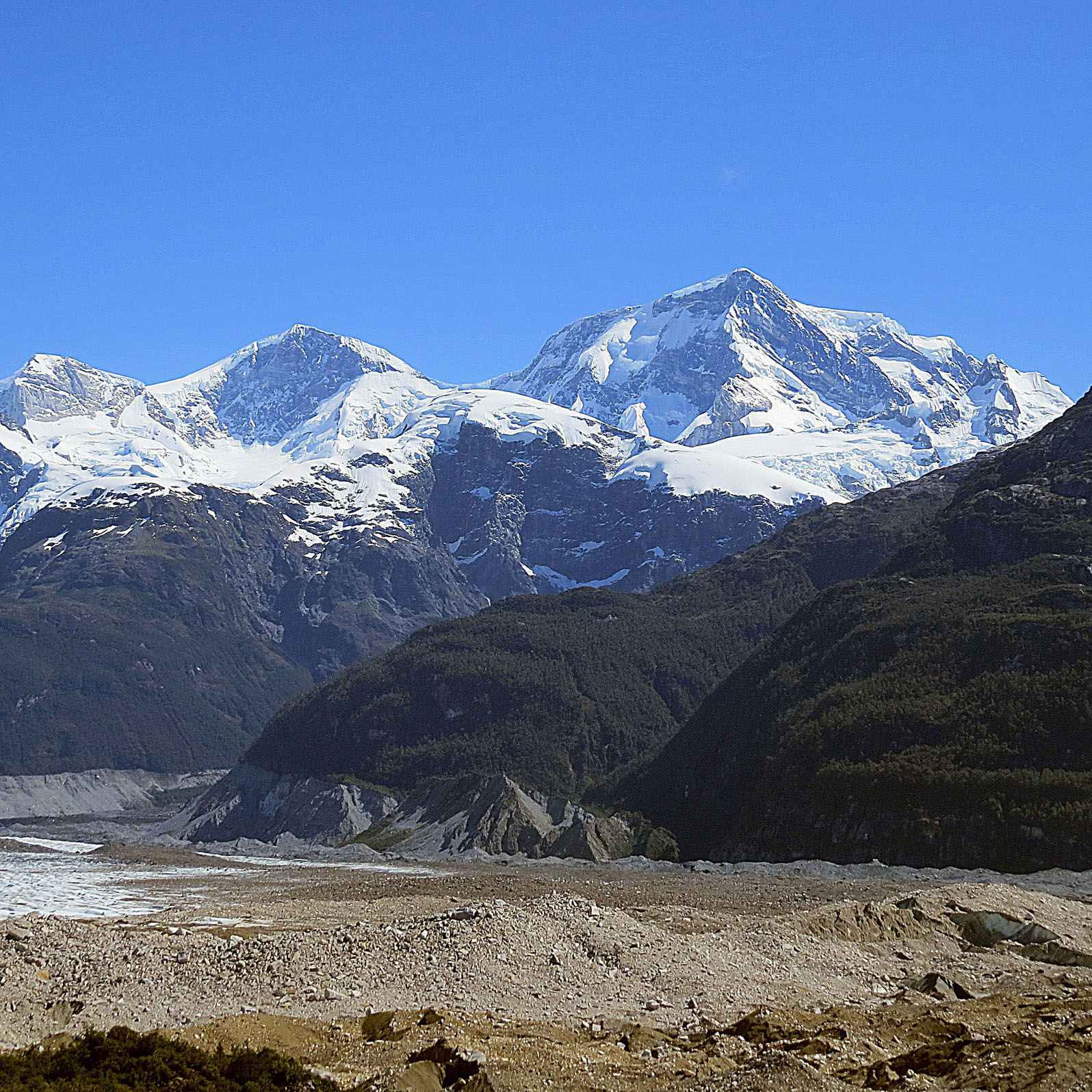 San Valentin Macizo, punto mas alto al izguierda?